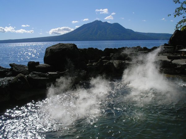 支笏湖いとう温泉の露天風呂。後方は風不死岳。